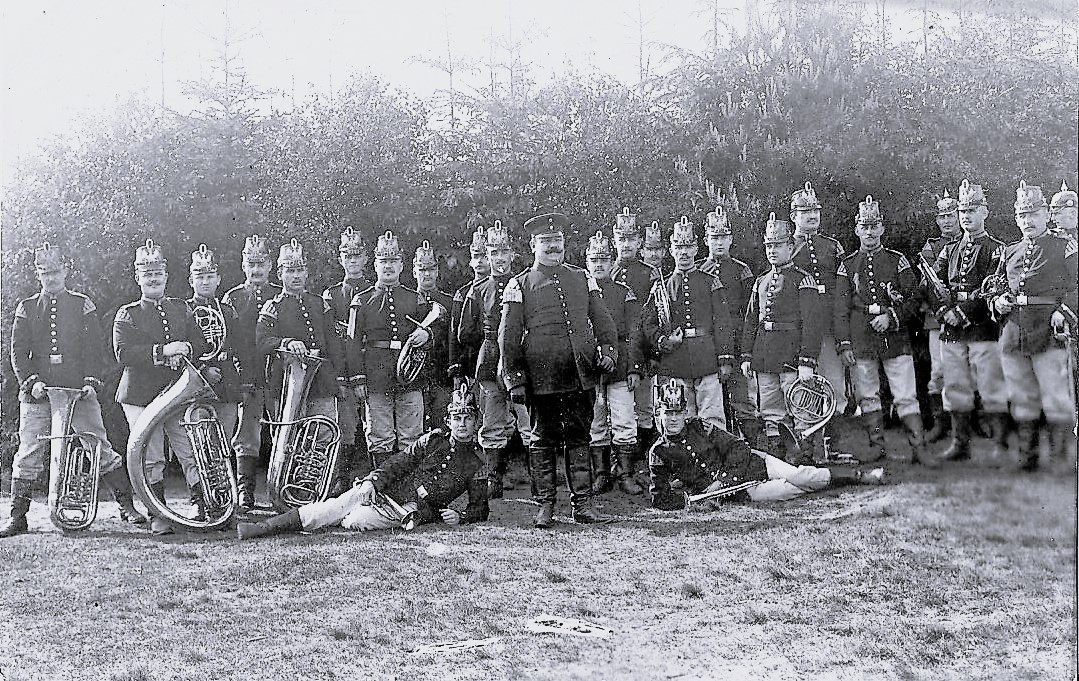 Postkarte - Musikkorps, aufgenommen im Lockstedter Lager 1910